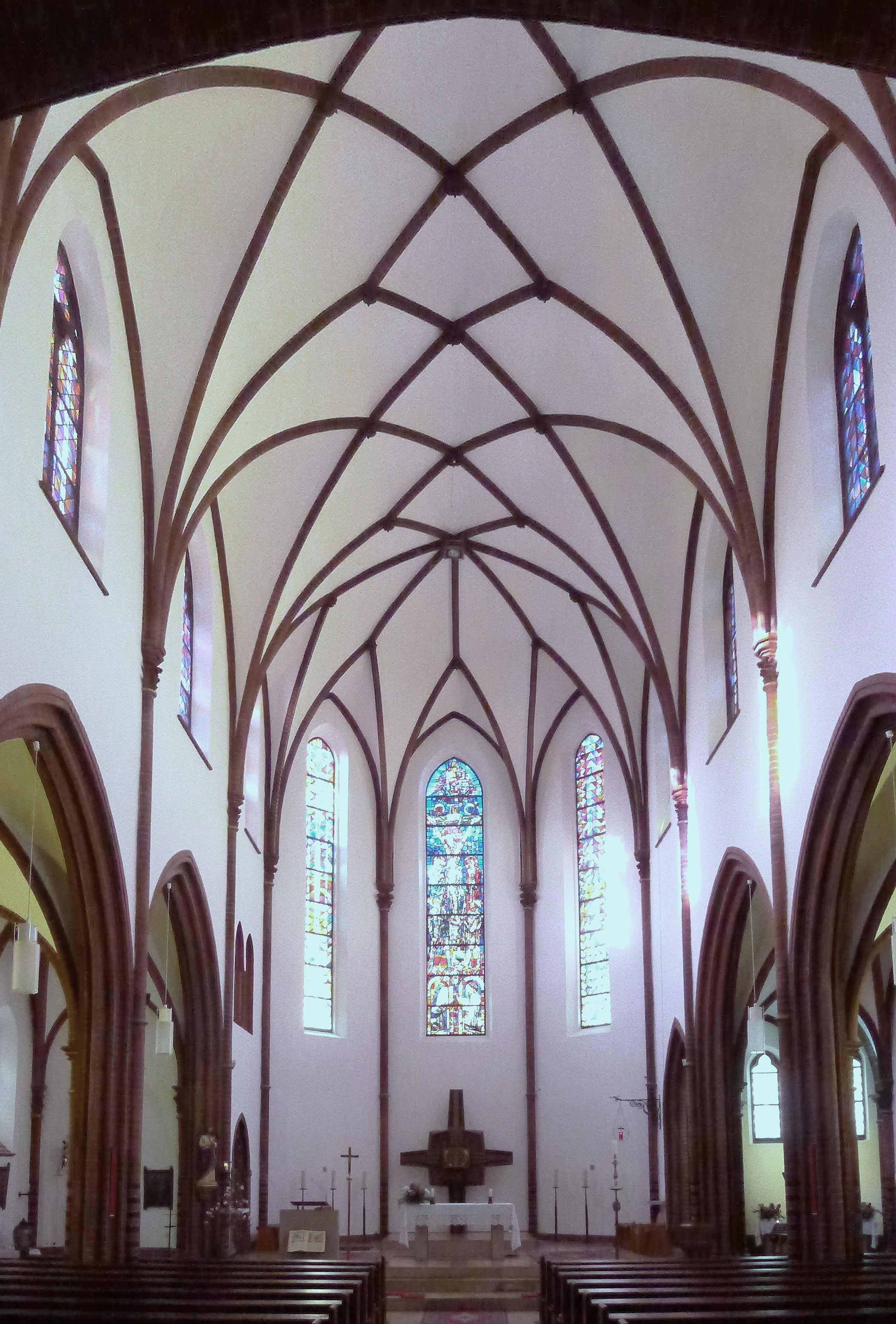 Mittelschiff mit Blick auf die Apsis.